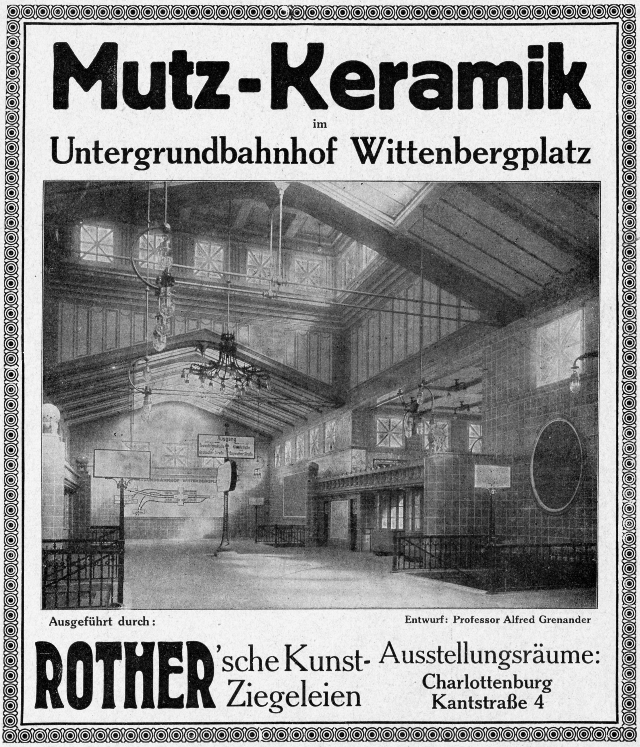 Werbeanzeige der Firma Mutz-Keramik, die mit der Auskleidung des Empfangsgebäudes des U-Bahnhofs Wittenbergplatz wirbt.